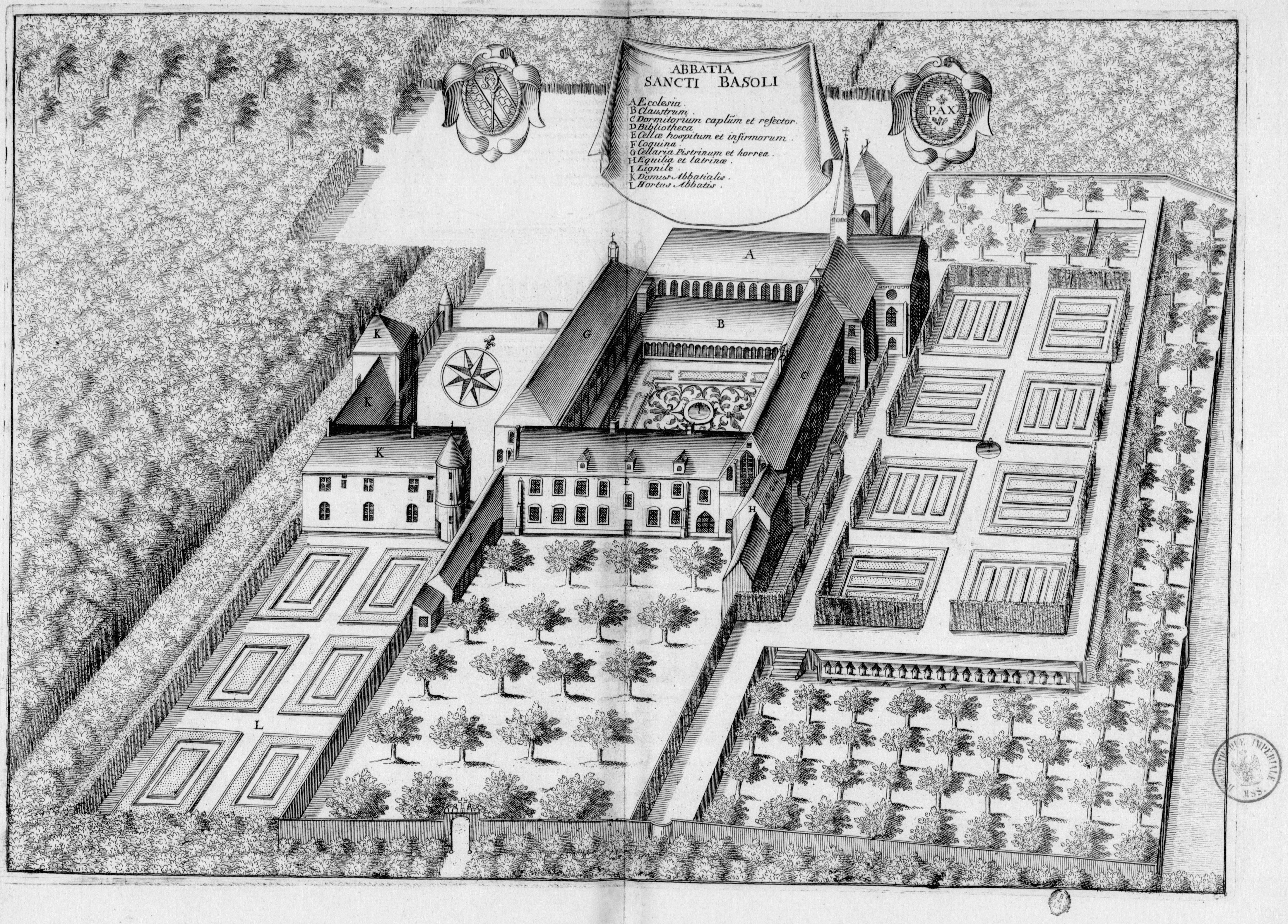 Planche gravée du 17ème siècle représentant l'abbaye Saint-Basle de Verzy, dans le livre Monasticon Gallicanum.